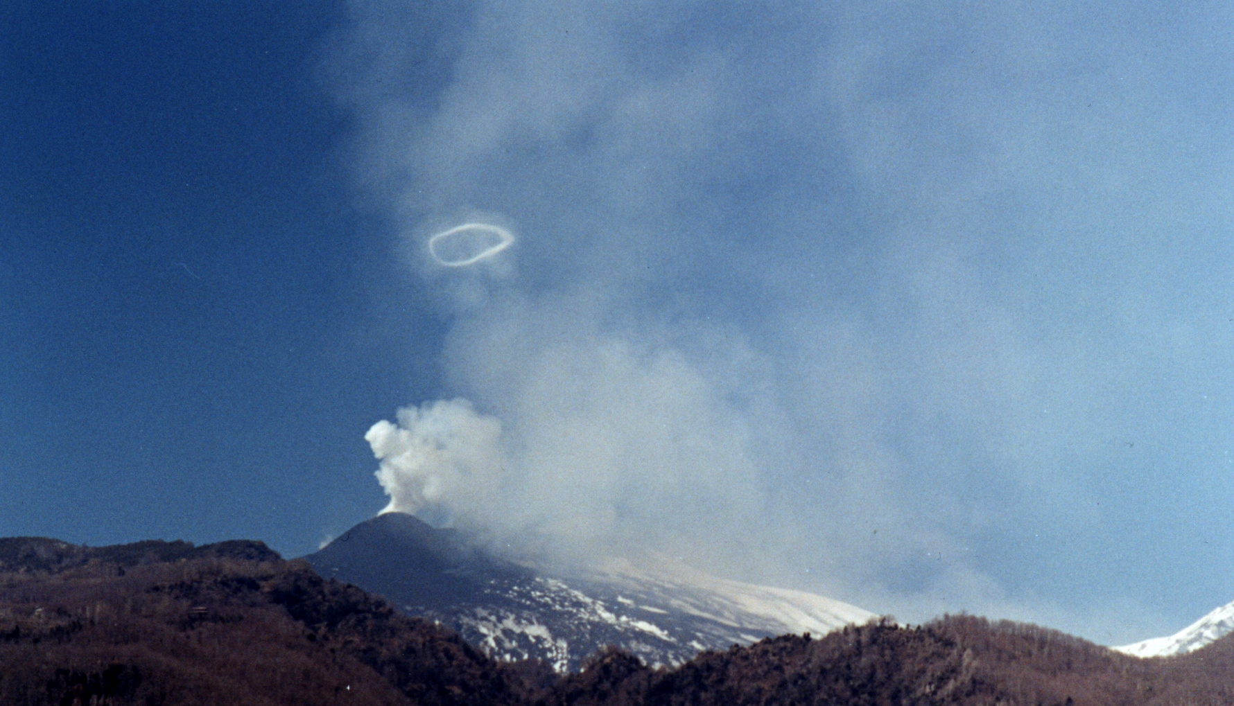 Foto da Zafferana Etnea dell'anello di fumo prodotto dal vulcano Etna